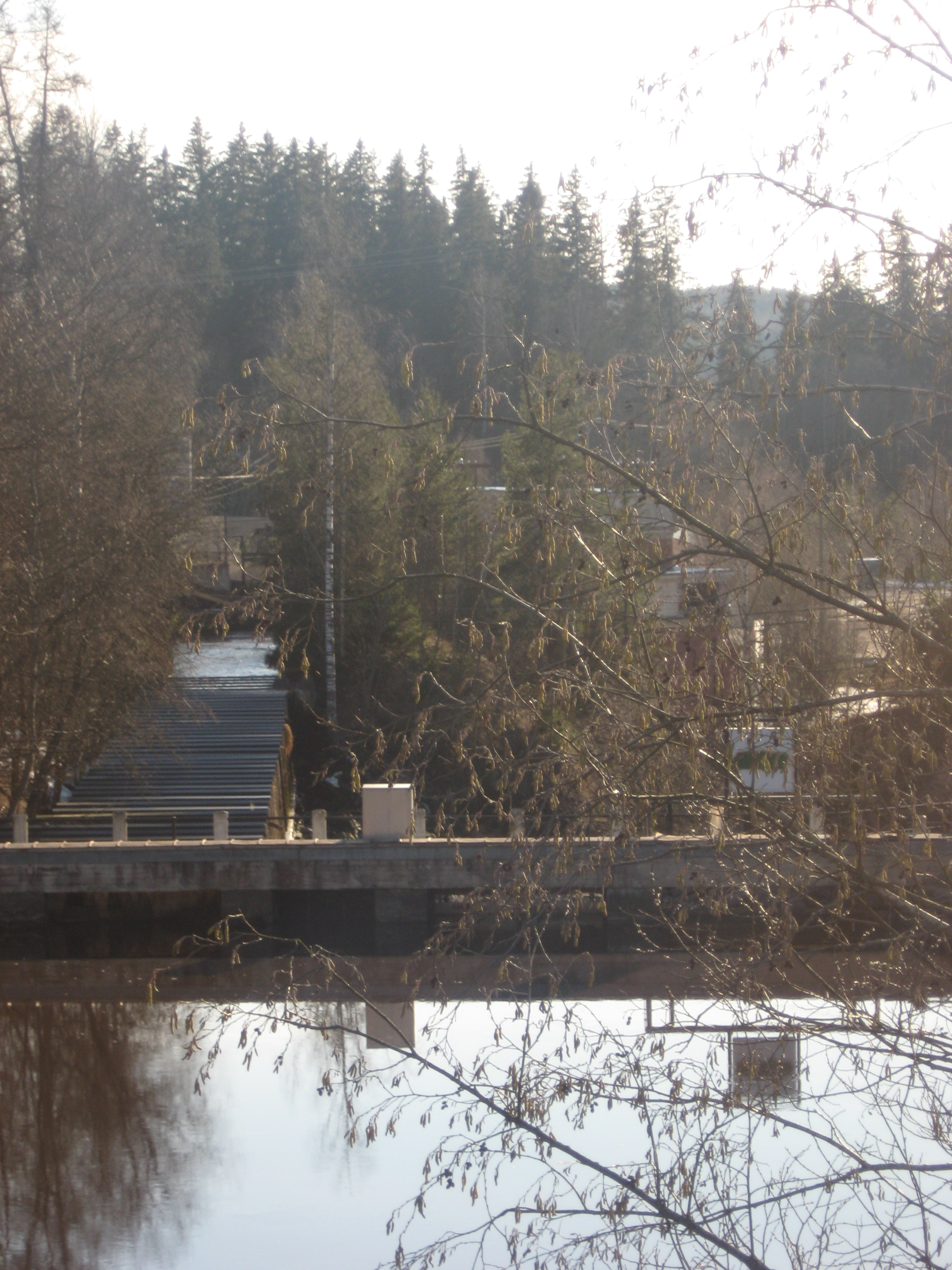 Jokioisten patoallas. Voimalalle johtava kanava kuvassa vasemmalla